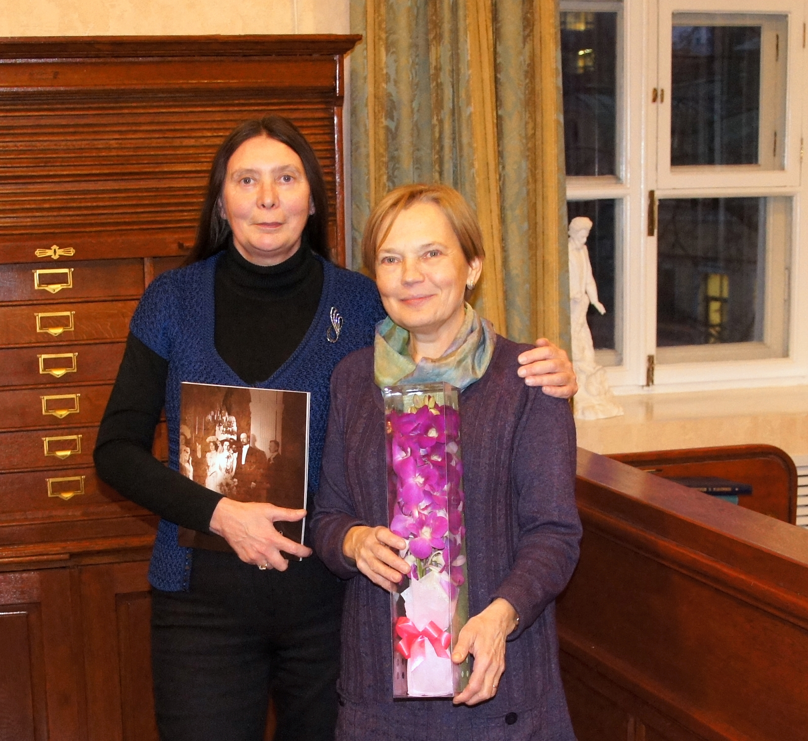 Е. Л. Минина на презентации книги "Минералогическая коллекция Л. П. Прохоровой"